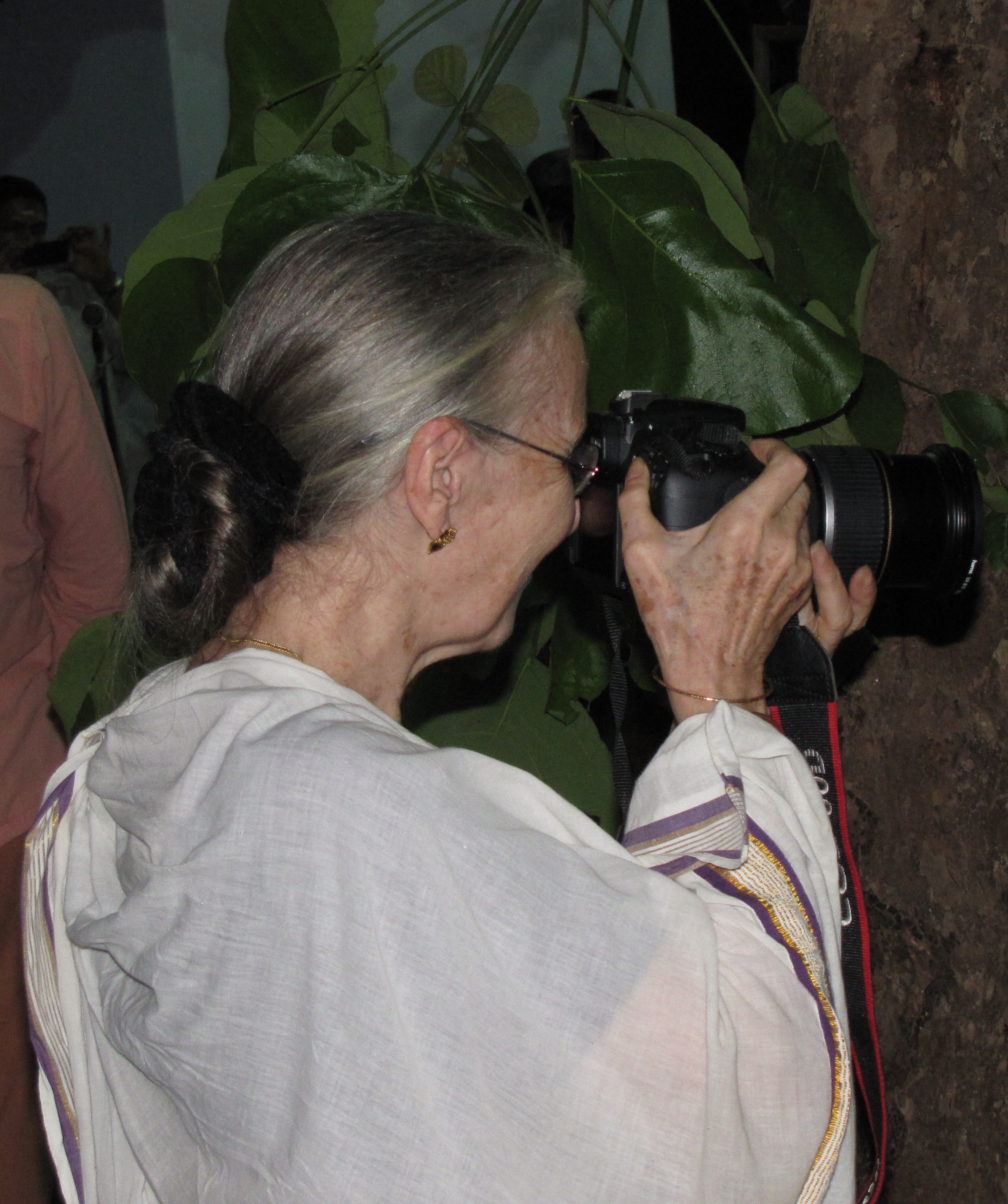 Pepita Seth taking photograph